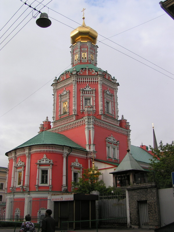 Богоявленский собор (Москва, Китай-город, 17.06.2006)